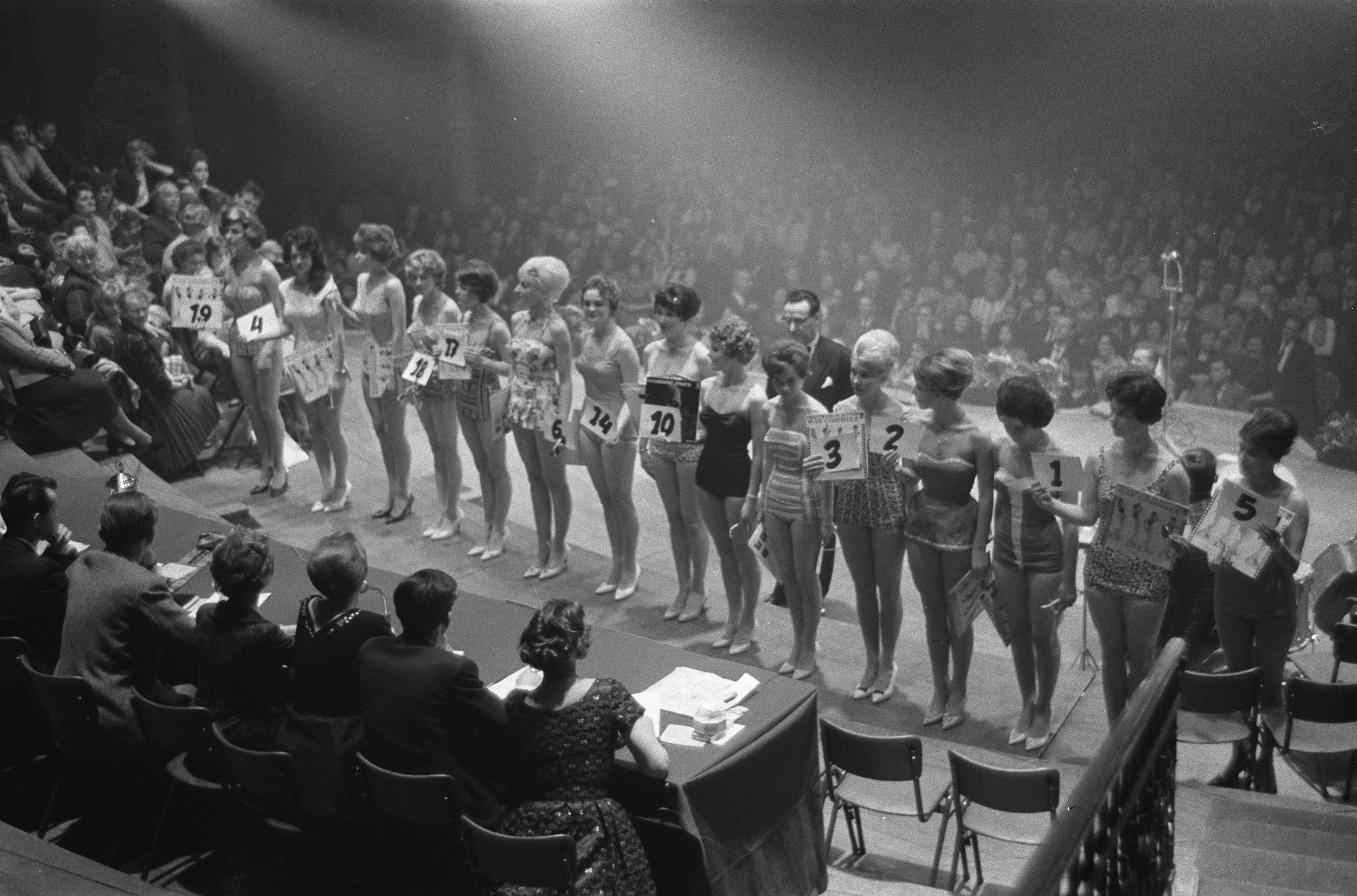 Collectie / Archief : Fotocollectie Anefo Reportage / Serie : [ onbekend ] Beschrijving : Verkiezing van Miss Amsterdam 1960 in het Concertgebouw de 19 deelneemsters Datum : 4 april 1960 Trefwoorden : CONCERTGEBOUWen, Verkiezingen, deelneemsters Persoonsnaam : Miss Amsterdam 1960 Fotograaf : Rossem, Wim van / Anefo Auteursrechthebbende : Nationaal Archief Materiaalsoort : Negatief (zwart/wit) Nummer archiefinventaris : bekijk toegang 2.24.01.05 Bestanddeelnummer : 911-1485